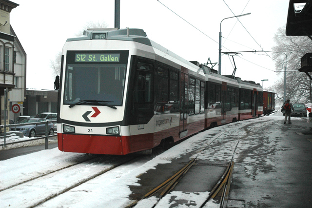 Trogenerbahn treinstel Be 31 van het type Be 4/8 te Trogen. Na aflevering van nieuwe treinstellen gaan deze serie treinstellen naar de Strassenbahn Neuenburg (französisch: Neuchâtel).